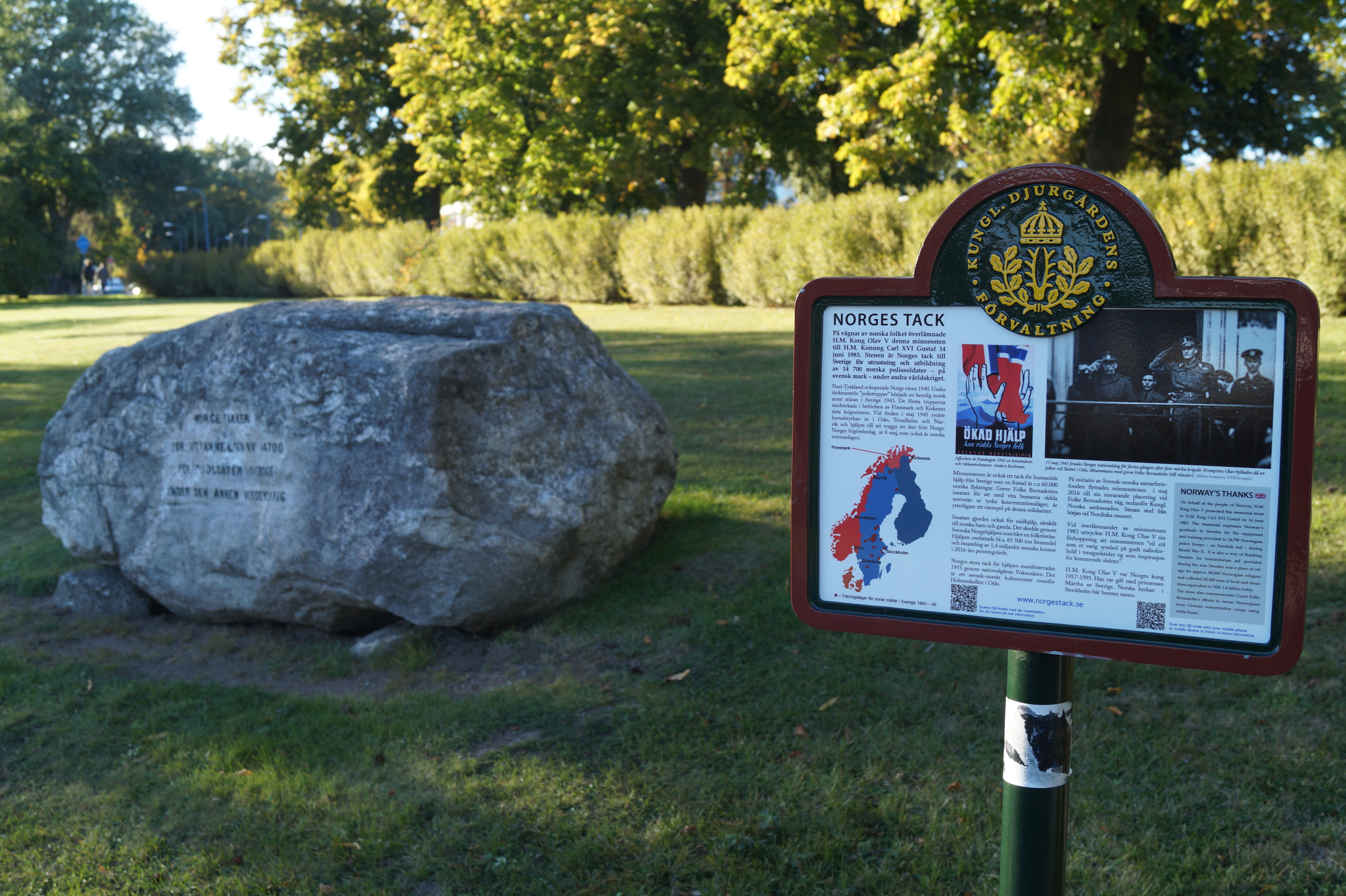 Minnesstenen med informationskylt i förgrunden.